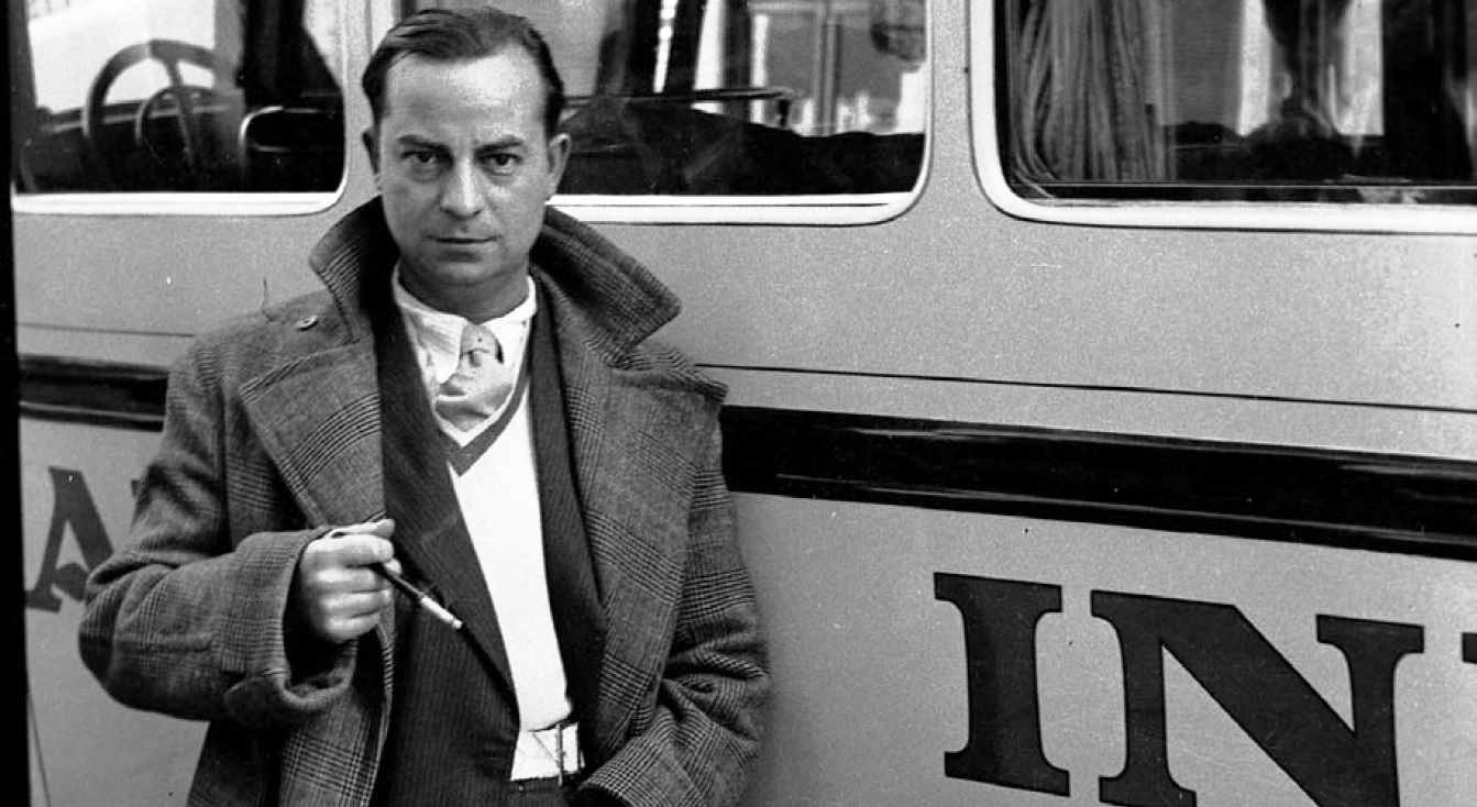 Eduardo Blanco Amor en Ourense